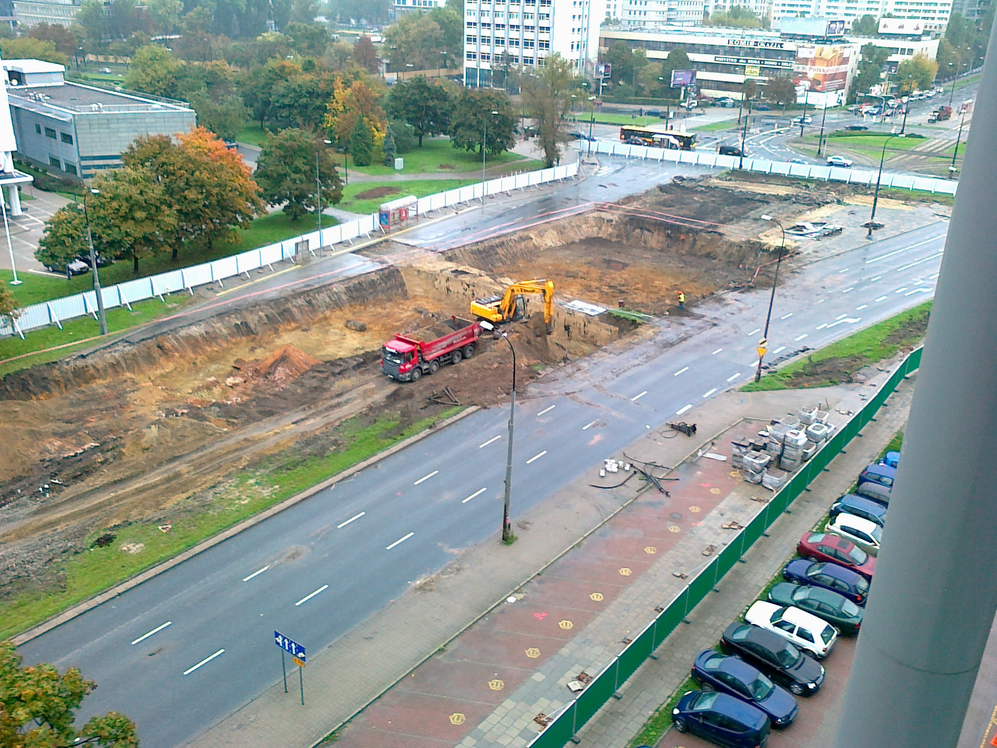 Prace przy budowie stacji Rondo Daszyńskiego II linii metra warszawskiego.